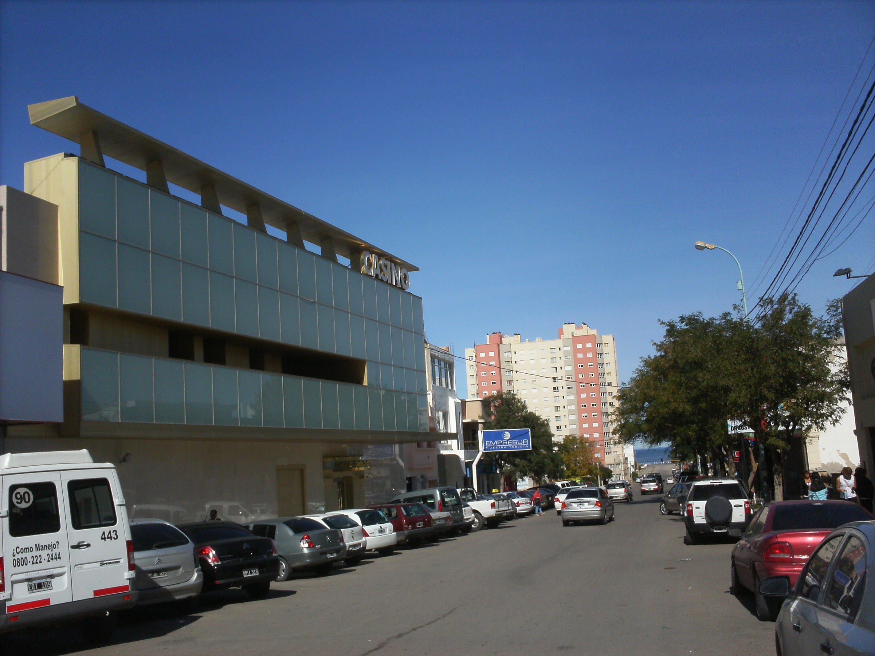 El Casino Club (1992), empresur y un edificio torraca en Comodoro Rivadavia.